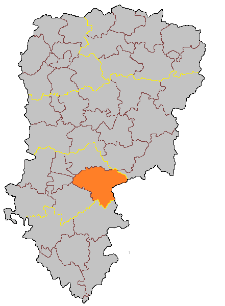 Кантон Брен на карте департамента Эна